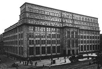 Warsaw, Bank Gospodarstwa Krajowego